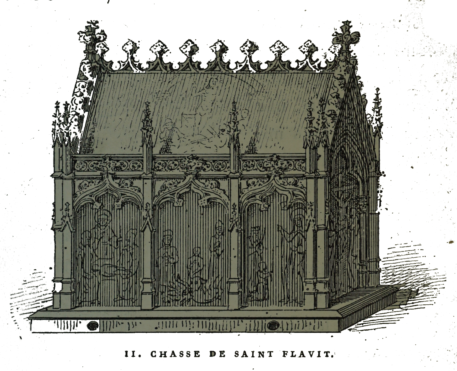 sur un dessin de Fichot.